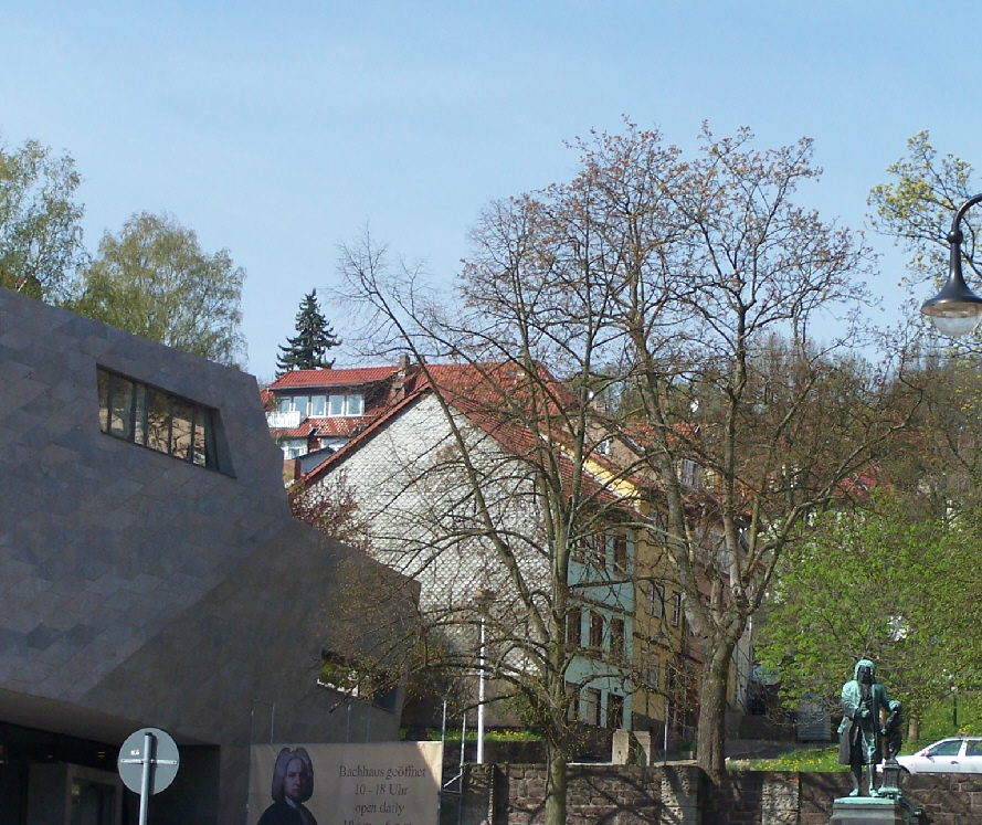 Häuser am Frauenberg